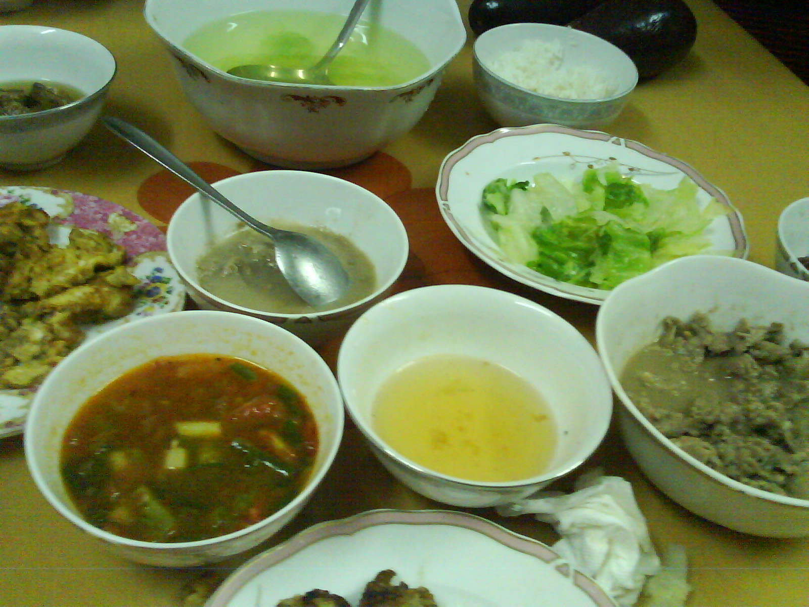 Một bữa cơm của một gia đình tại Hà Nội.